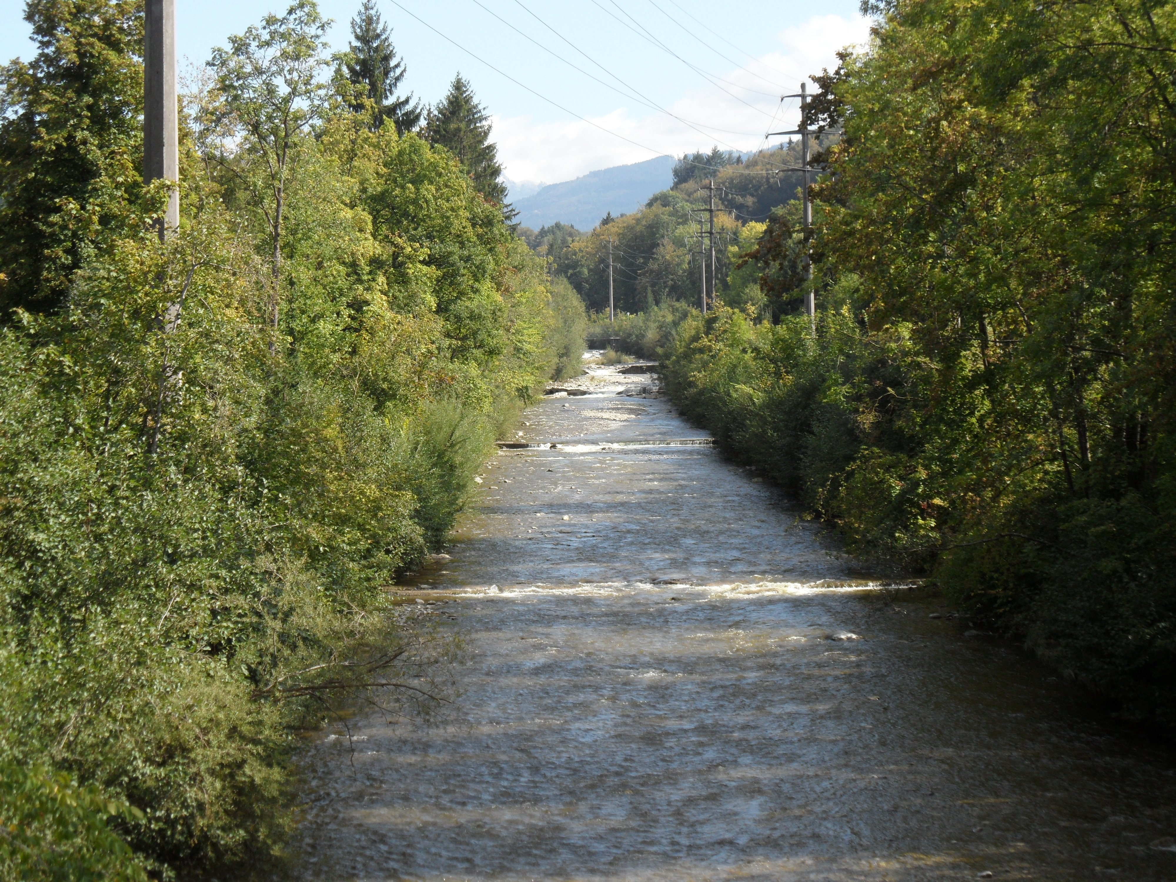 La Gérine, rivière qui traverse Marly, canton de Fribourg en Suisse.